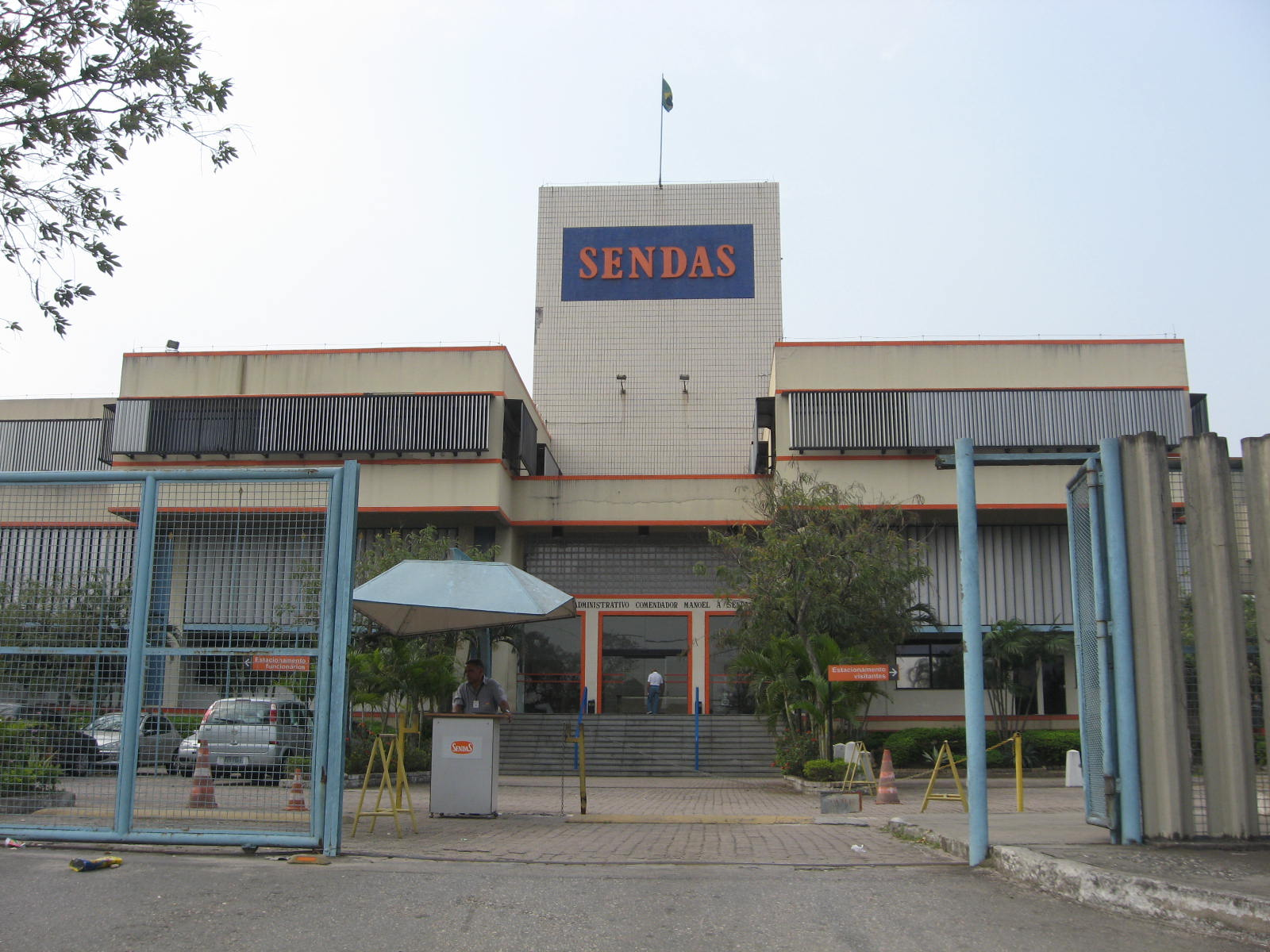 Sede administrativa das Sendas, em São João de Meriti.